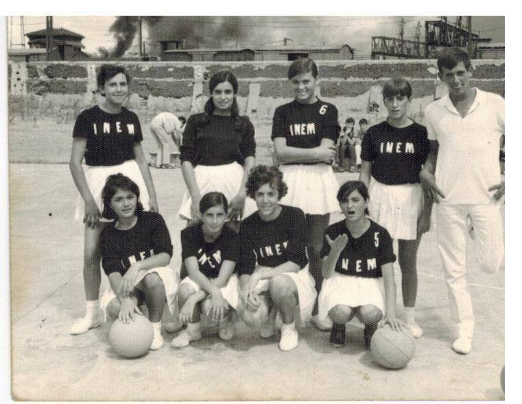 Primer equipo femenino de baloncesto del Instituto. Fotografía de finales de los años 60